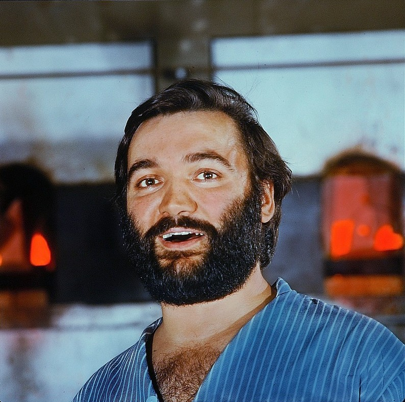 Original image description from the Deutsche Fotothek Glasmacher